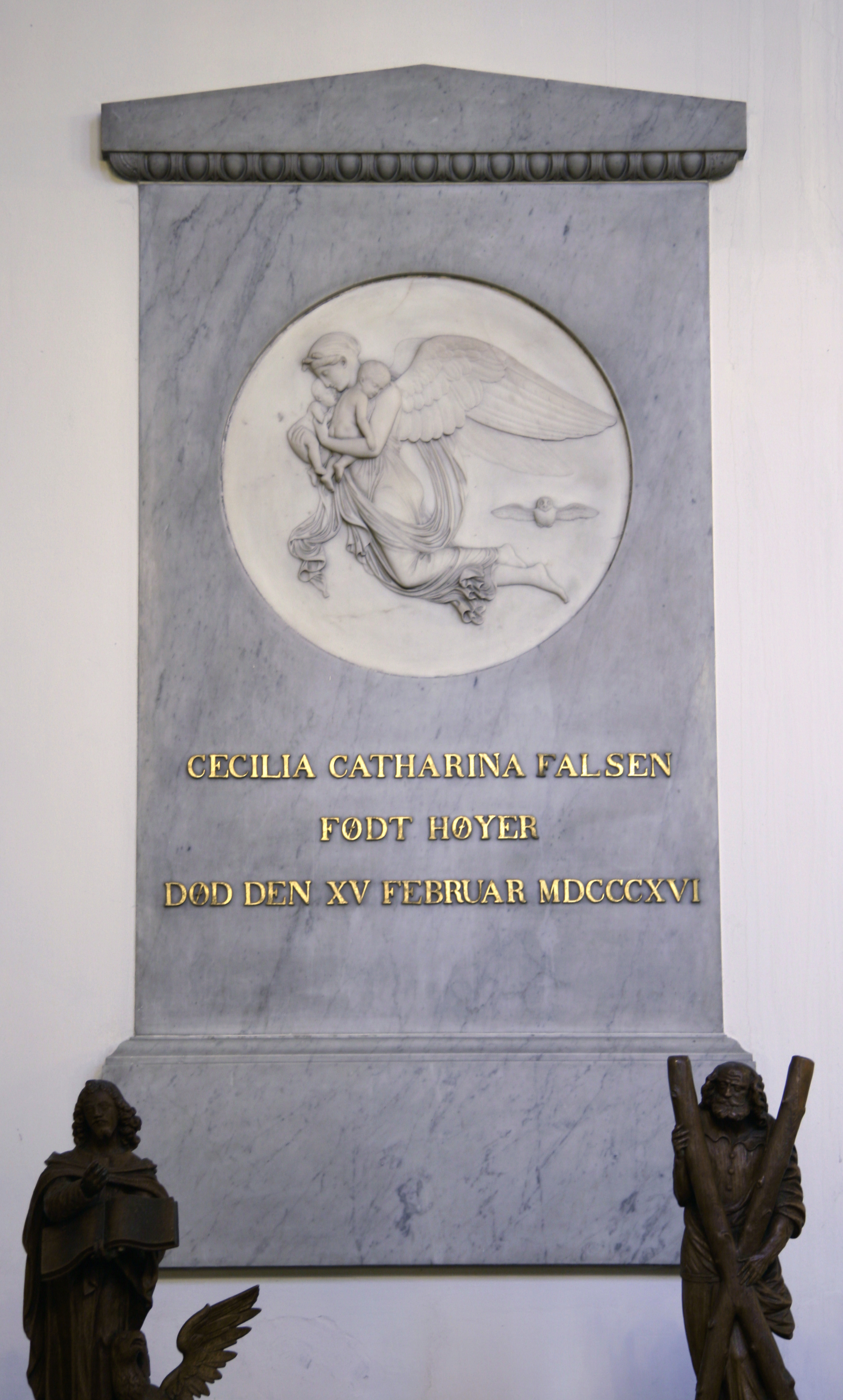 Holmens Kirke, Copenhagen, Denmark . Cecilia Catharine Falsens epitafium på Korgangens sydvæg. Relief af Thorvaldsen. 1828.